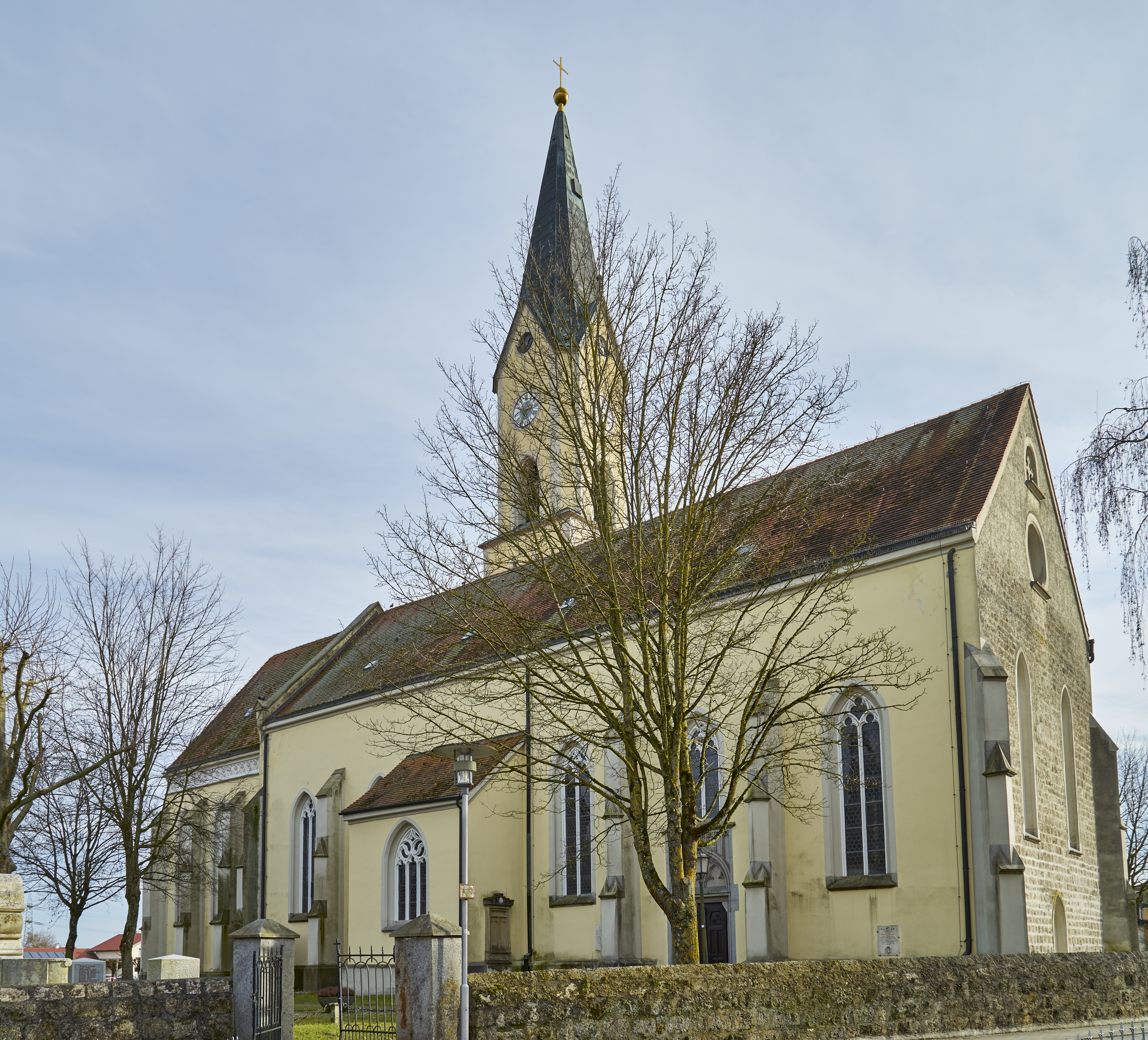 Katholische Pfarrkirche St. Petrus, Hartkirchen. Saalkirche mit eingezogenem Polygonalchor, Chorflankenturm, Seitenkapellen, Vorhalle und doppelgeschossiger Sakristei, spätgotisch, bezeichnet 1487, Verlängerung nach Osten, Chorneubau und Turmerhöhung, Äußeres neugotisch überformt, Johann Baptist Schott, 1890; mit Ausstattung; Friedhofsmauer aus Tuffsteinblöcken, wohl 19. Jahrhundert. Ansicht von Nordosten.